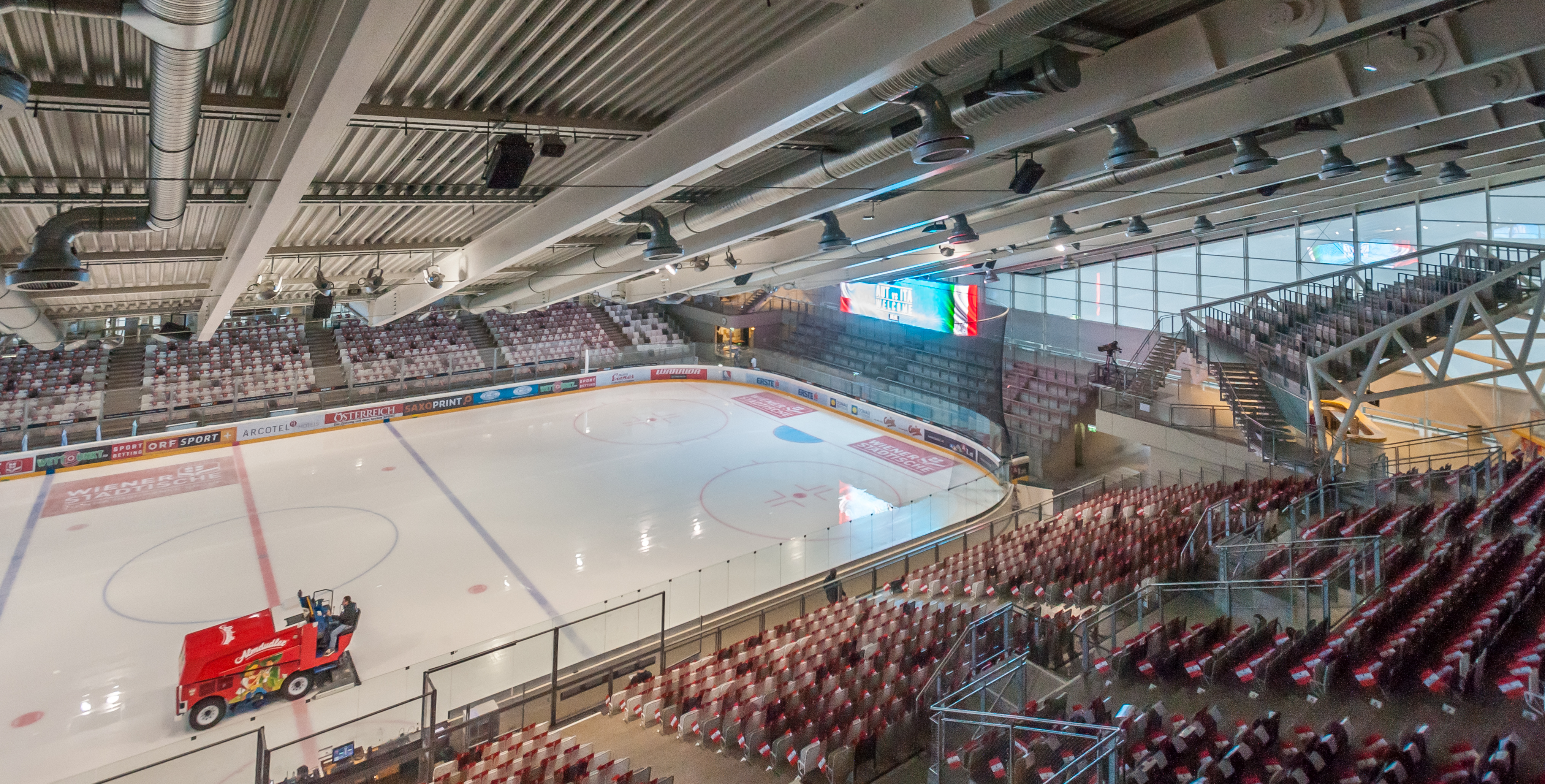 Freundschaftliches Eishockey-Länderspiel - Österreich vs Italien. Bild zeigt Albert-Schultz-Halle.